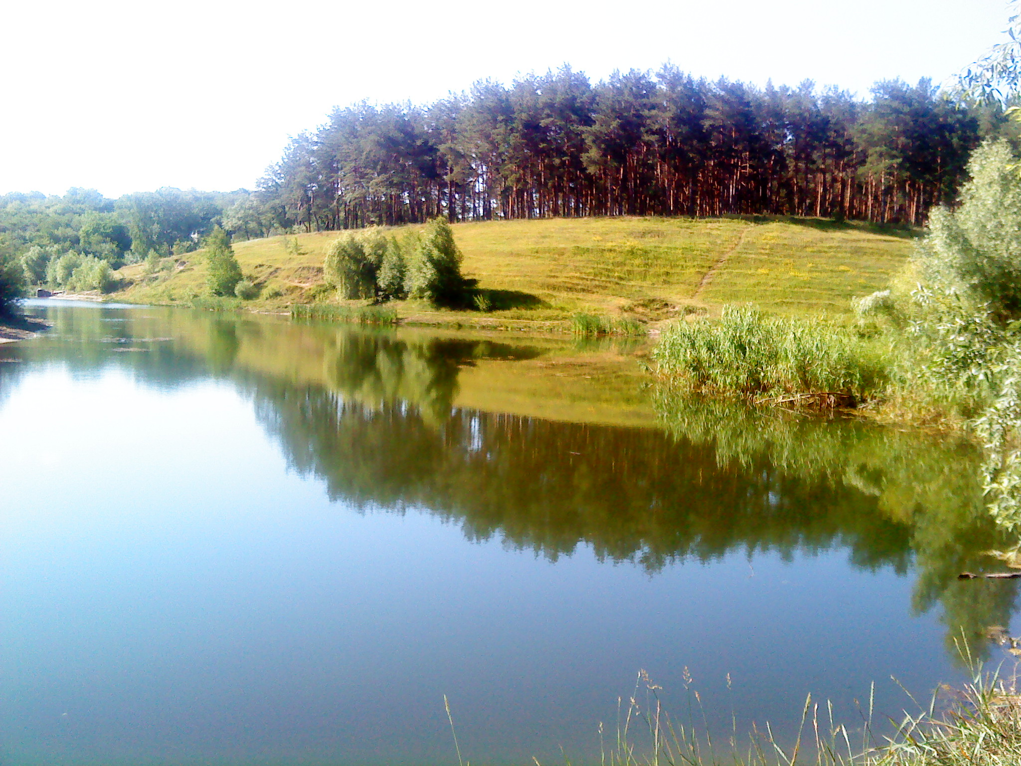 Став поблизу соснового лісочка